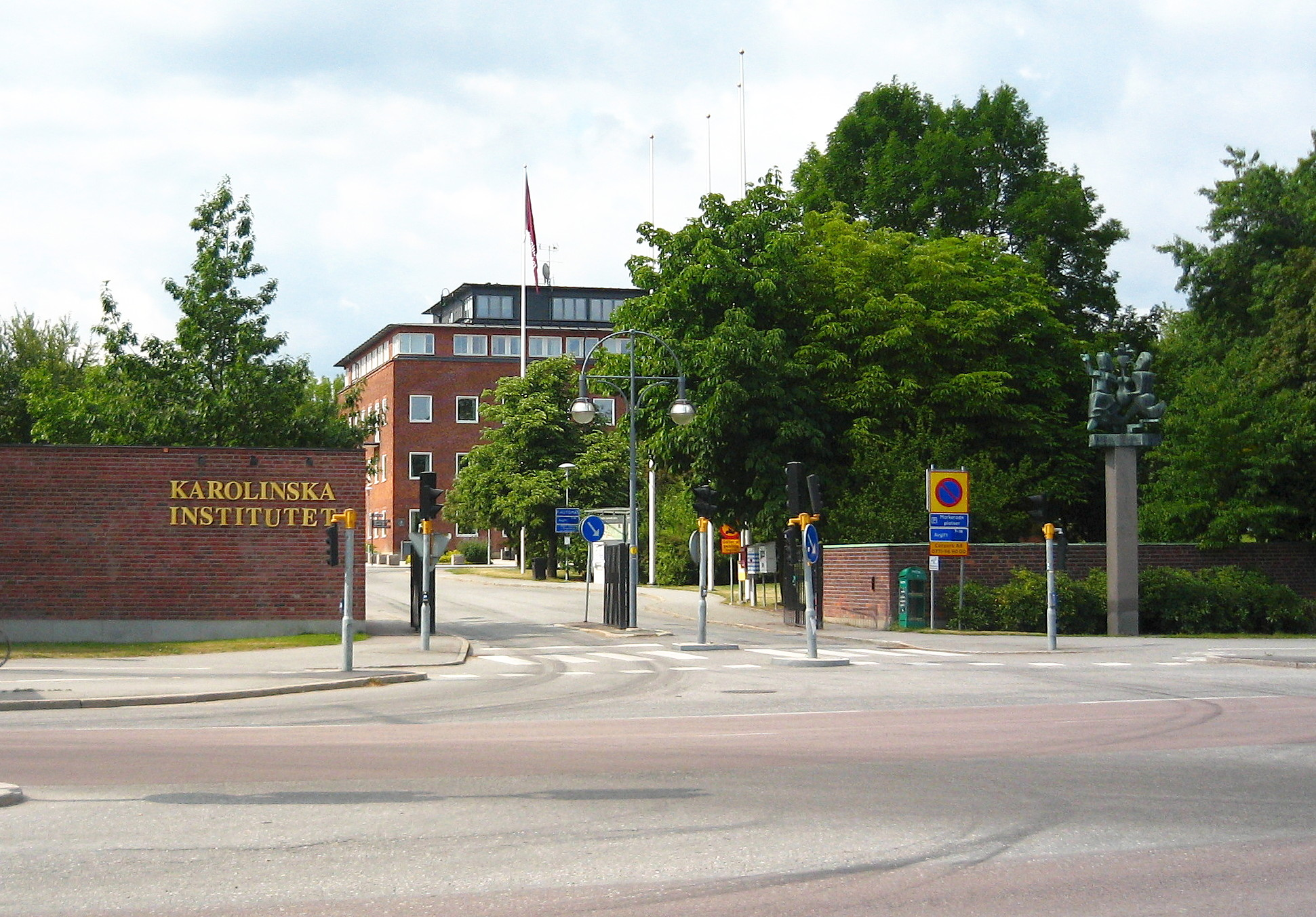 Karolinska Institutet, infart från Solnavägen